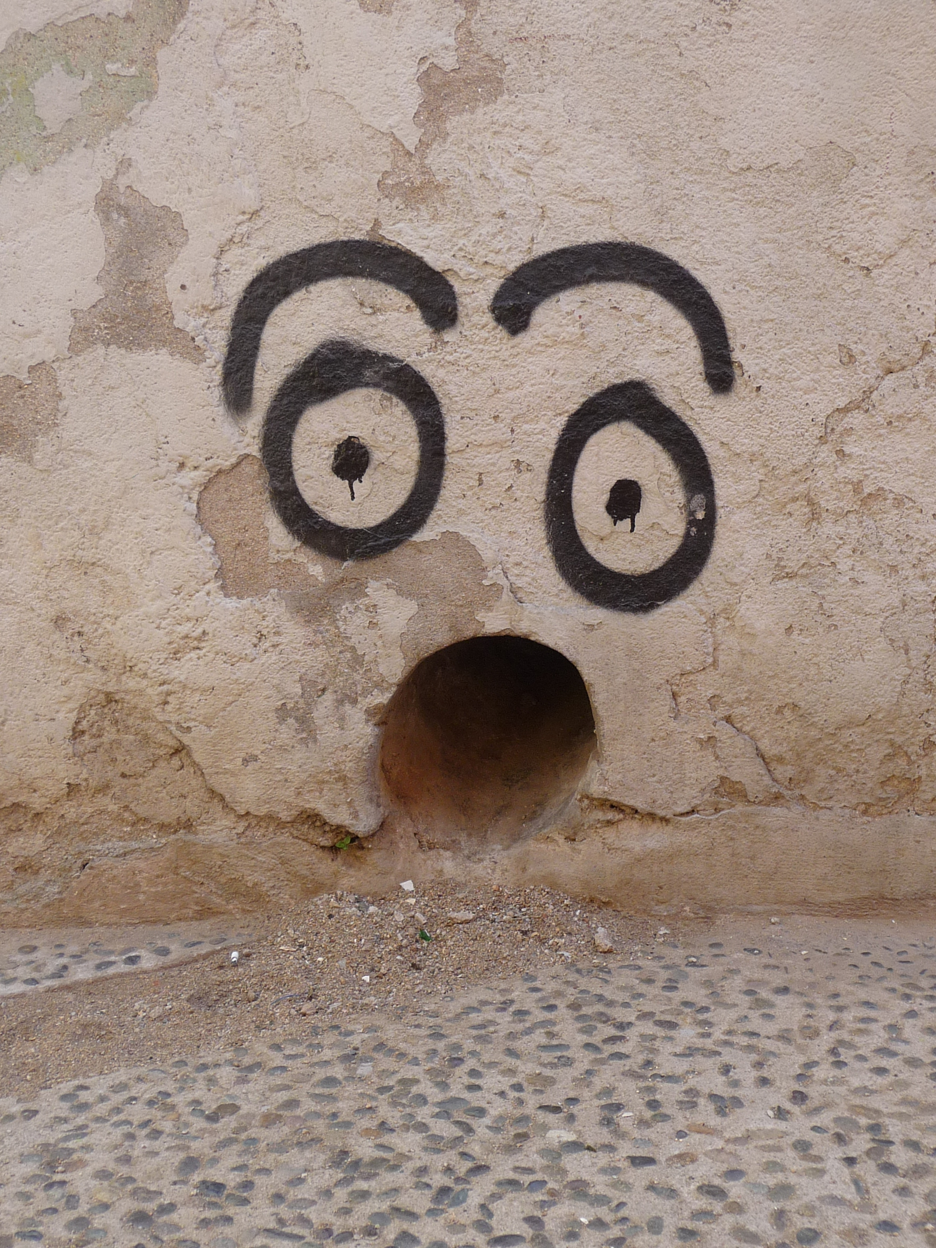 Grafiti en calle de Valparaíso, Chile